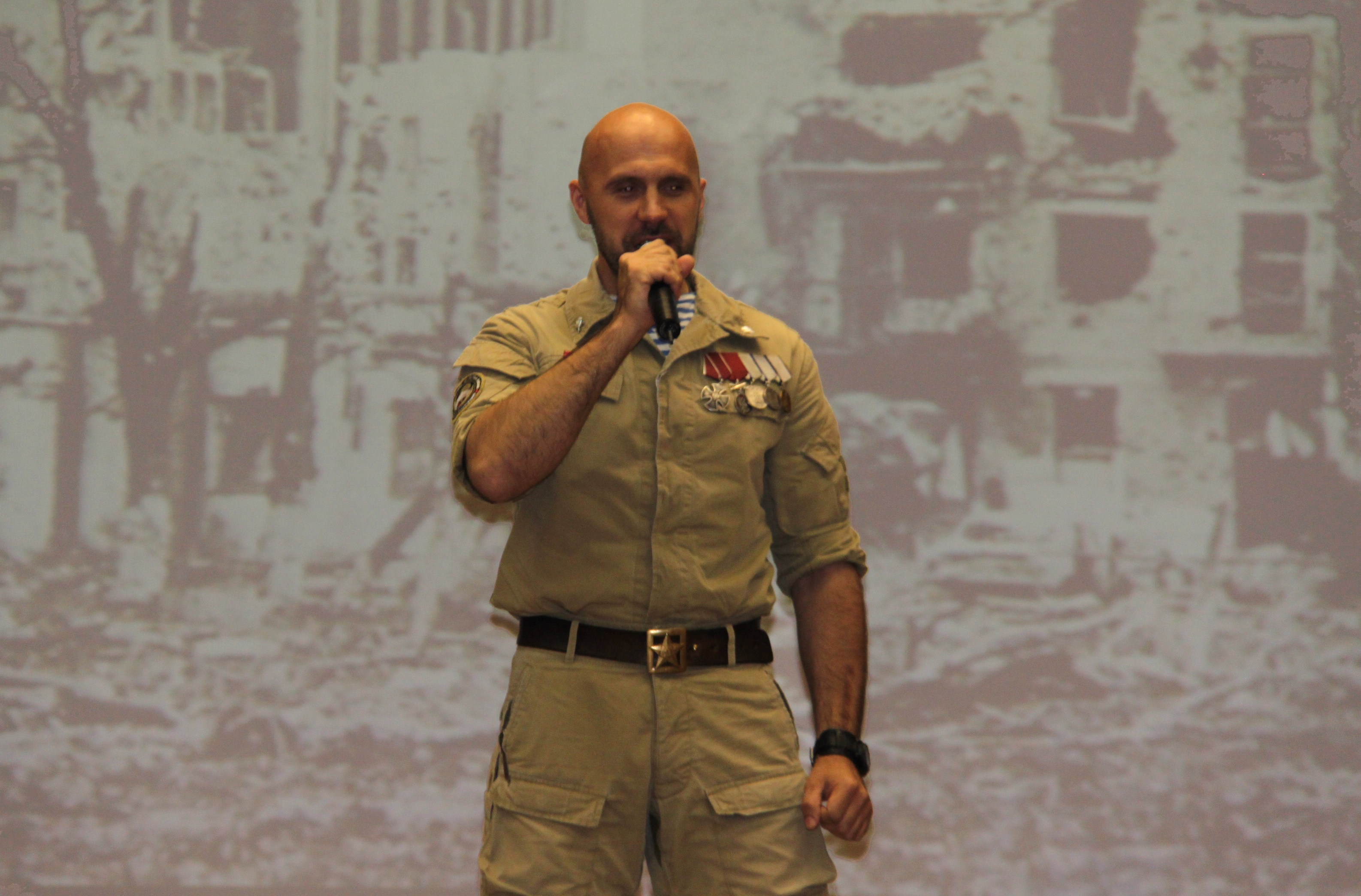 Автор—исполнитель Вячеслав Корнеев